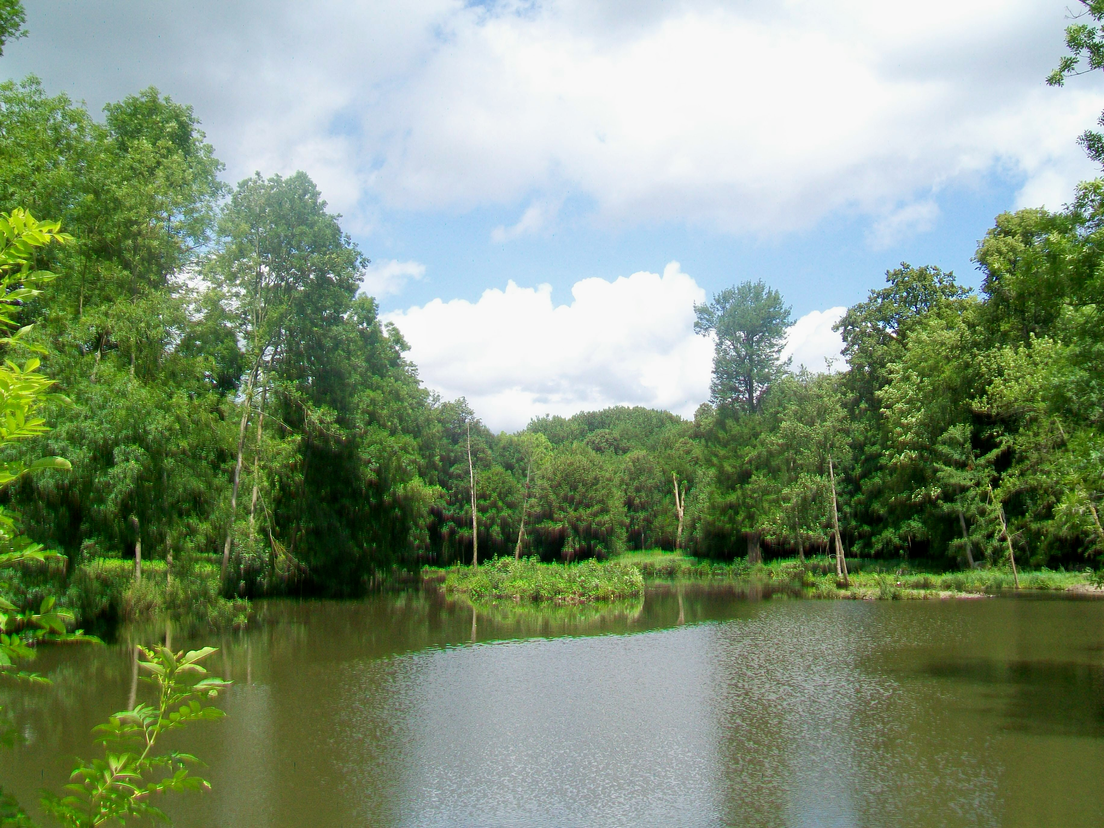 La rivière anglaise, pièce d'eau de 3 ha.